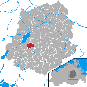 Grammentin, Landkreis Demmin, Mecklenburg-Vorpommern